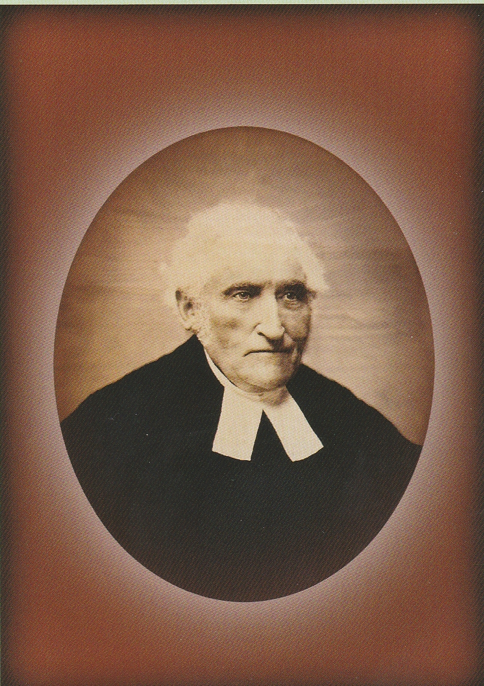 Porträt von Heinrich Schwerdt